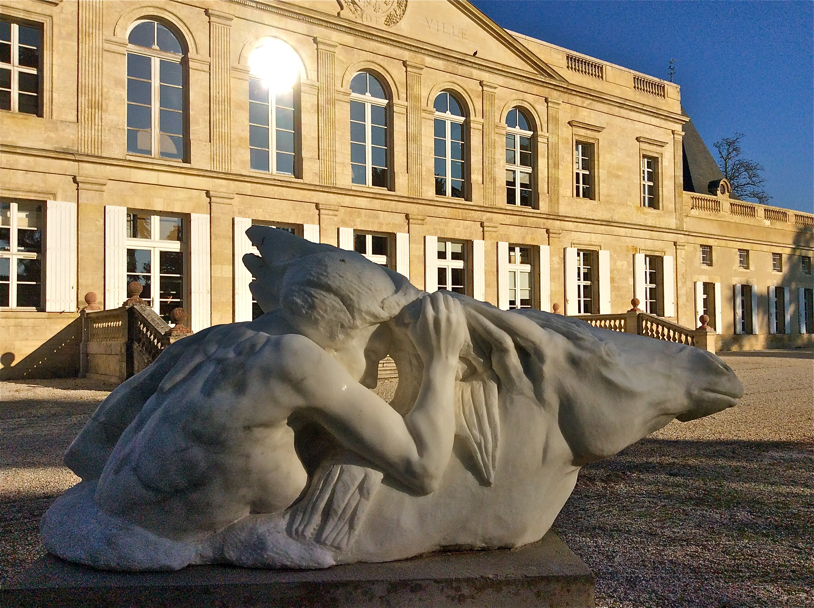 Sculpture de Danielle Bigata